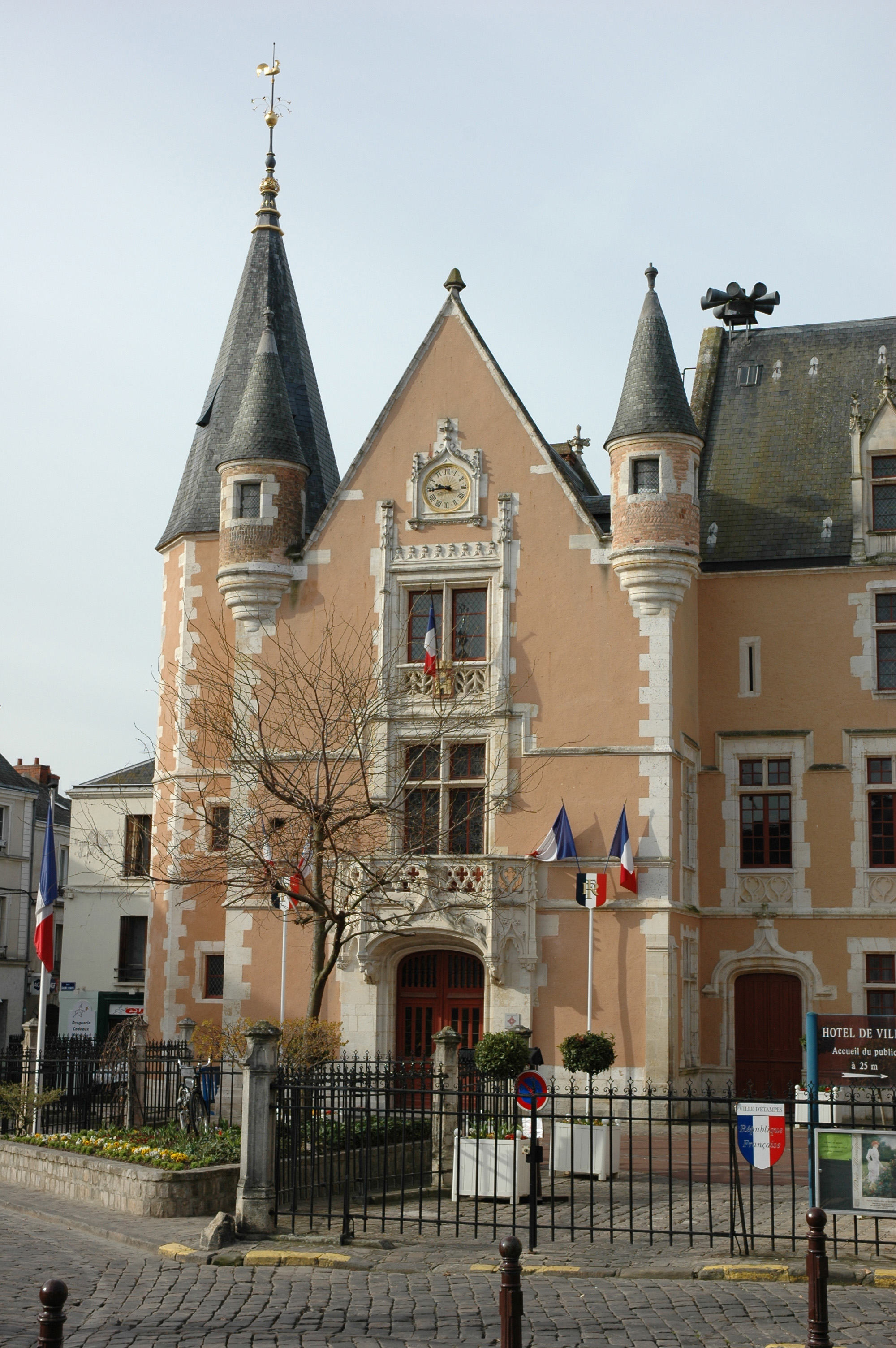 France Essonne Etampes l'Hôtel de ville Photographie prise par GIRAUD Patrick